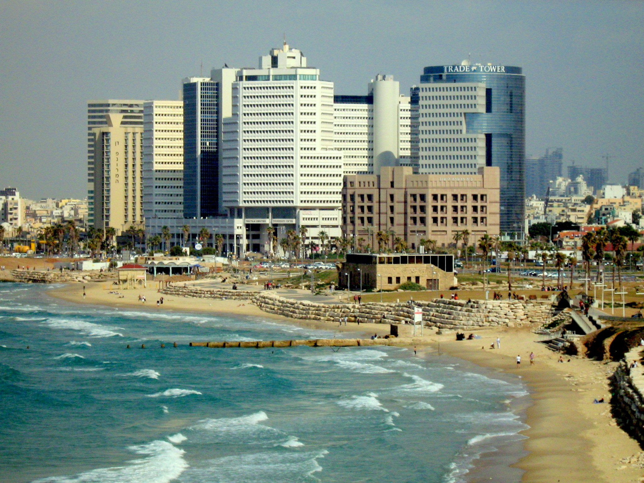 מנשיה ומוזיאון האצ"ל מיפו